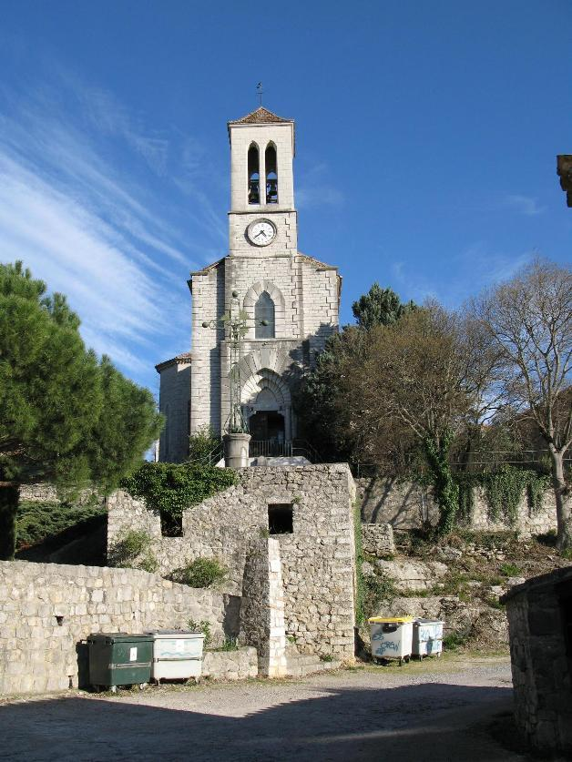 Balazuc